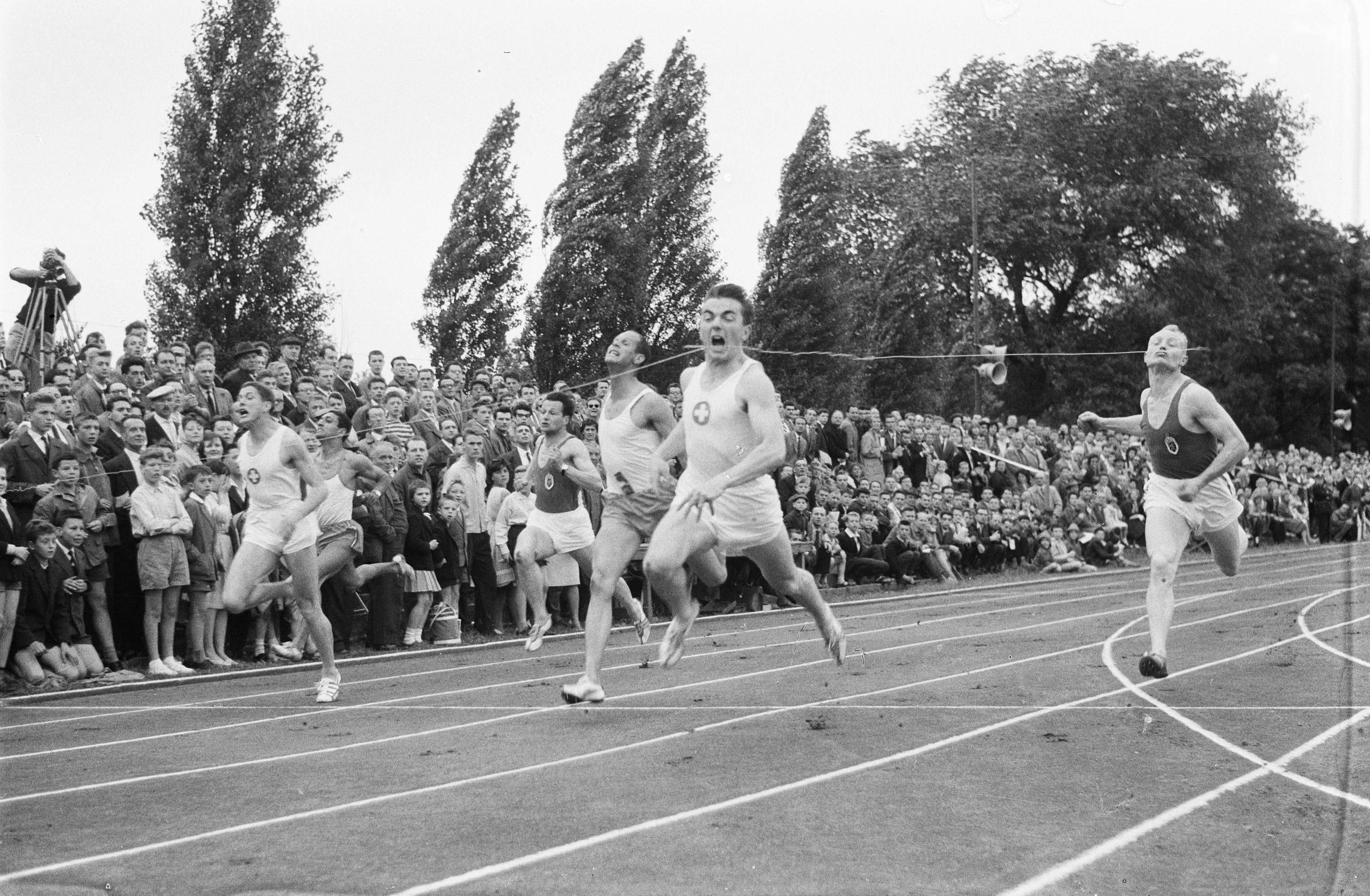 Collectie / Archief : Fotocollectie Anefo Reportage / Serie : [ onbekend ] Beschrijving : Landenontmoeting Belgie Nederland Zwitserland in Luik Datum : 17 juli 1960 Locatie : Luik Trefwoorden : atletiek Fotograaf : Pot, Harry / Anefo Auteursrechthebbende : Nationaal Archief Materiaalsoort : Negatief (zwart/wit) Nummer archiefinventaris : bekijk toegang 2.24.01.05 Bestanddeelnummer : 911-4287